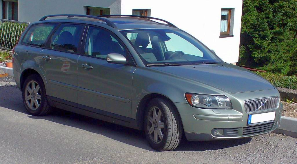 Volvo V50